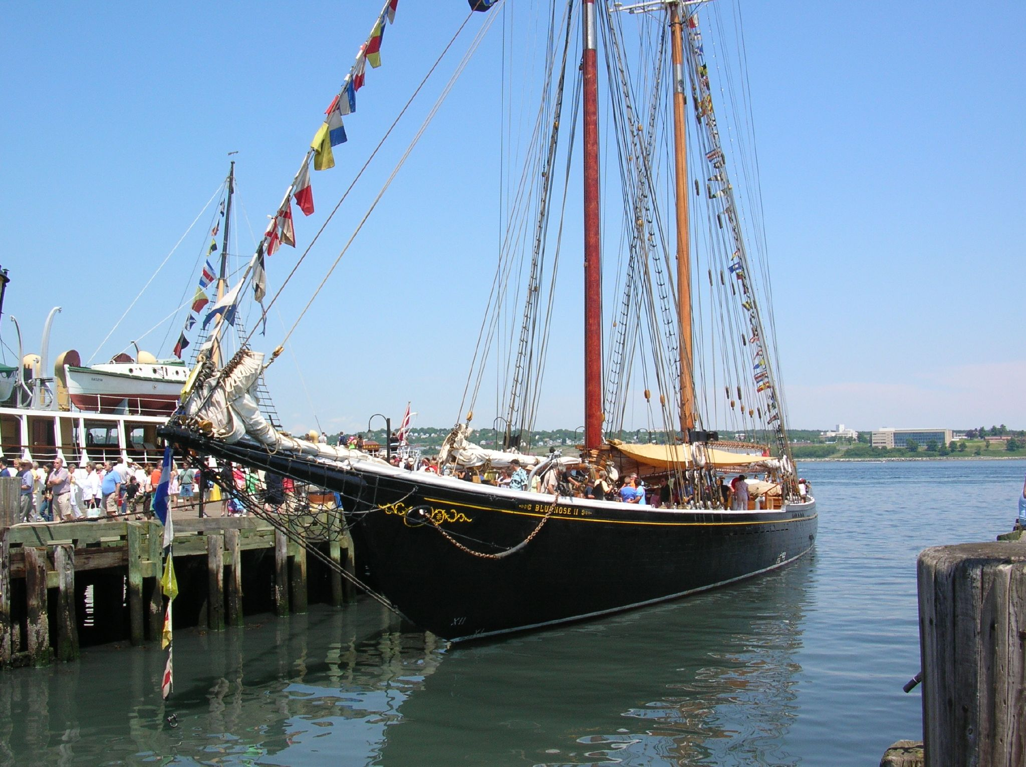 La goélette canadienne Bluenose II